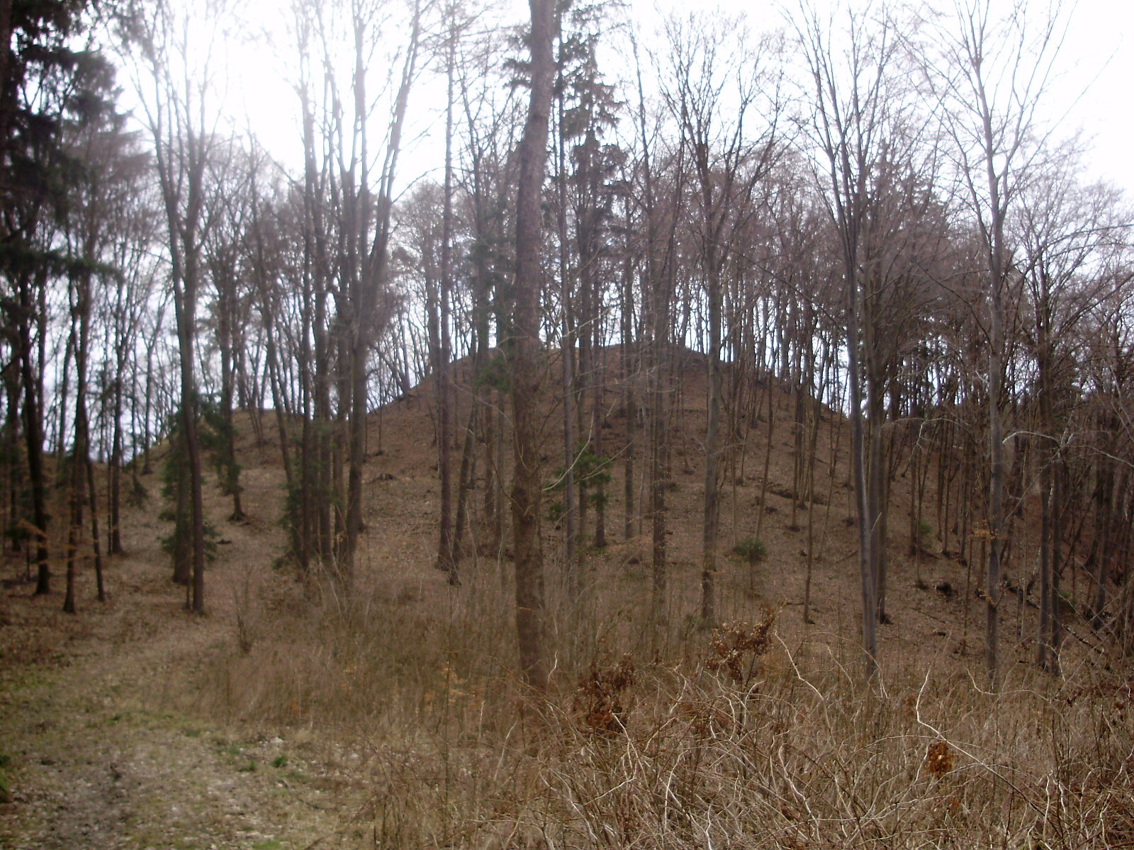 Pozůstatky hradu Stagnov (Vyškov- Czech republic)